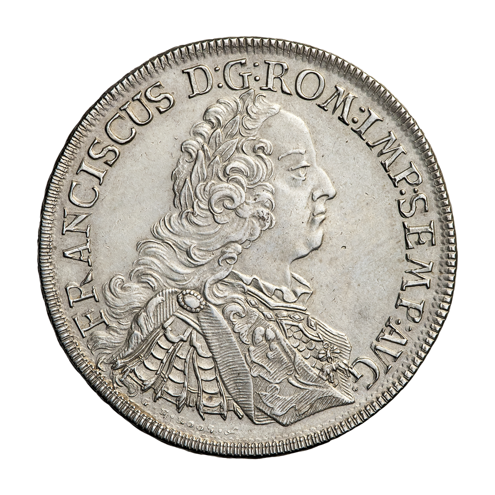 Регенсбург, имперский вольный город. Талер 1756 года. Император Франц I Габсбург (1745—1765). Минцмейстер И.К. Буш (1741—1766). Гравер Г.Ф. Лоос (1756 г.). Серебро. Вес 28,2 г. Диаметр 42,5 мм. Гурт узорный.